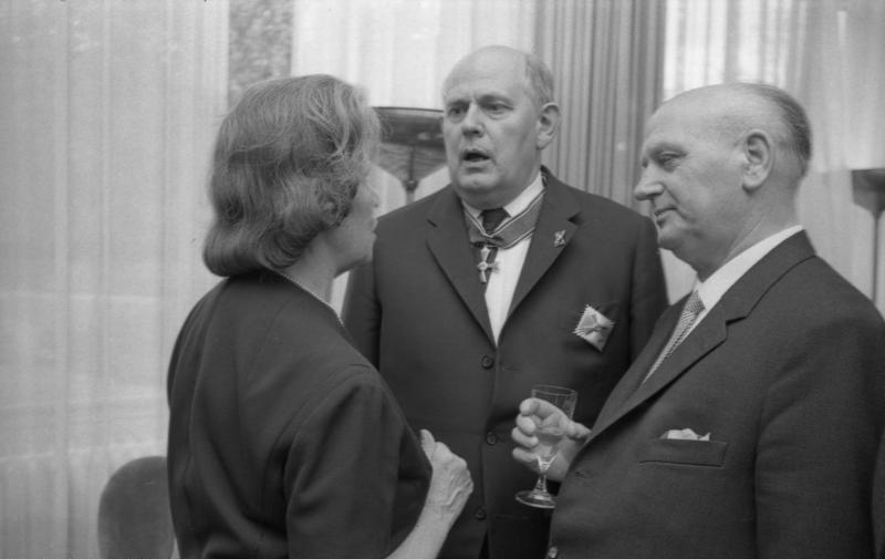 Empfang und Ordensverleihung an Bundestagsabg. durch Bundestagspräsident Dr. Gerstenmaier Bonn (v.l.n.r.: Dr. [Elinor] Hubert, Prof. Schellen, Otto Striebeck)